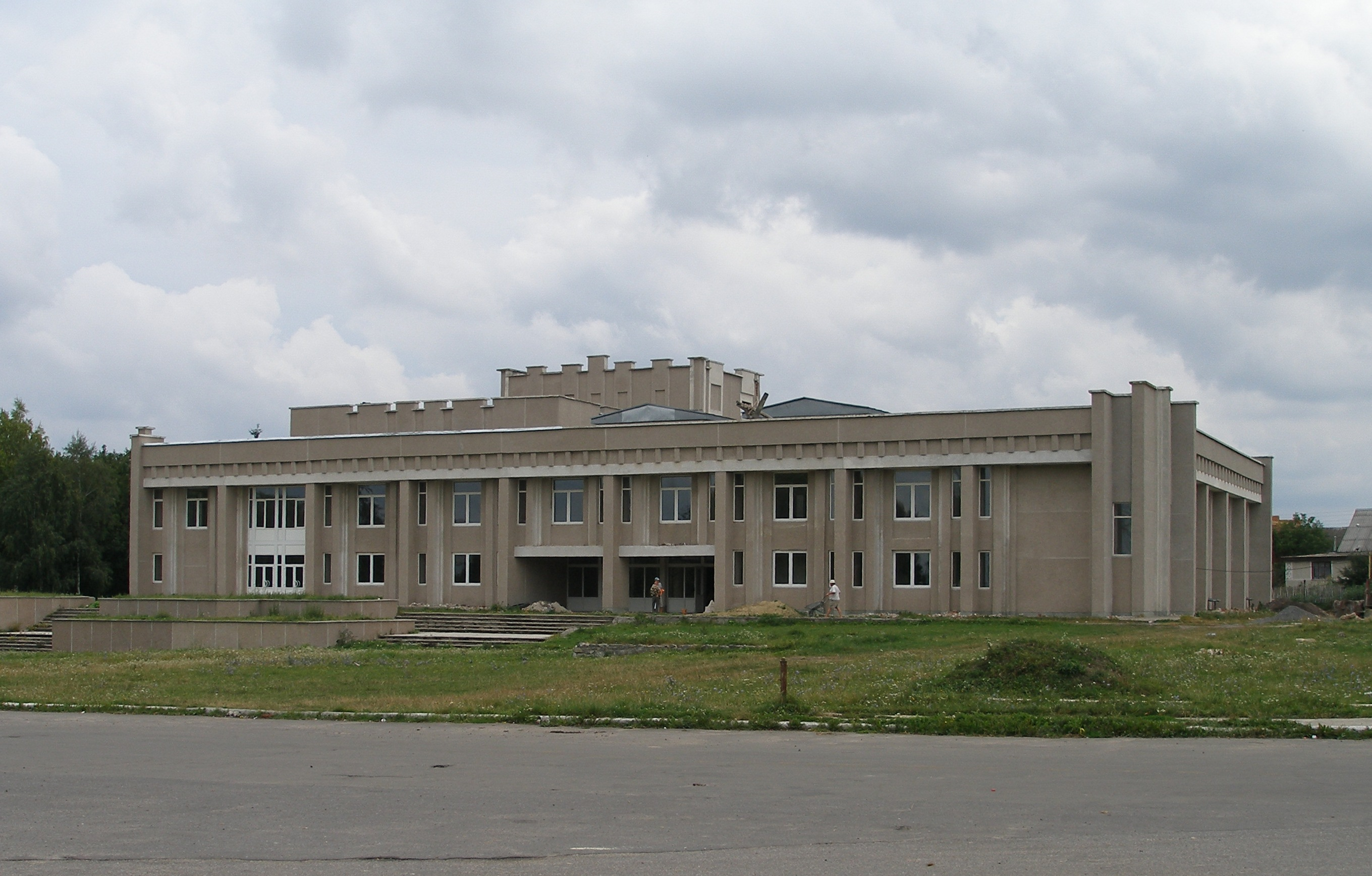 Дом культуры в Теофиполе.